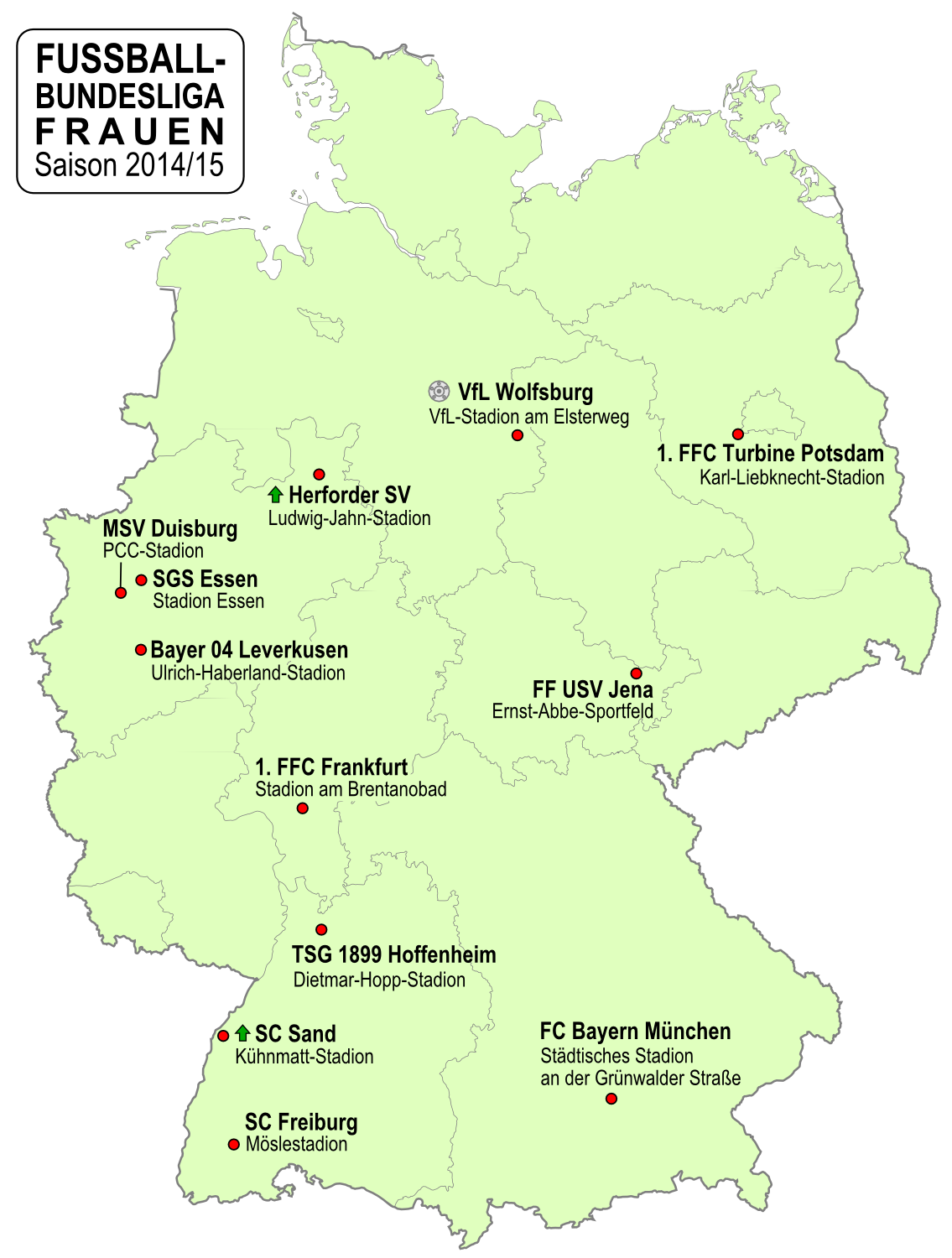 Karte der Vereine der Frauen Fußball-Bundesliga-Saison 2014/2015